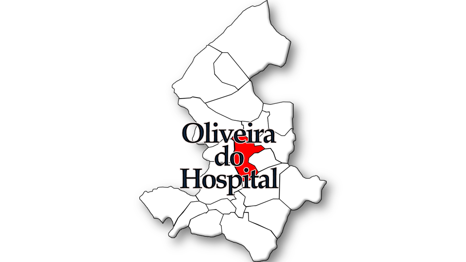 População